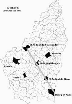 tracé de St Andéol sur une carte d'Ardèche